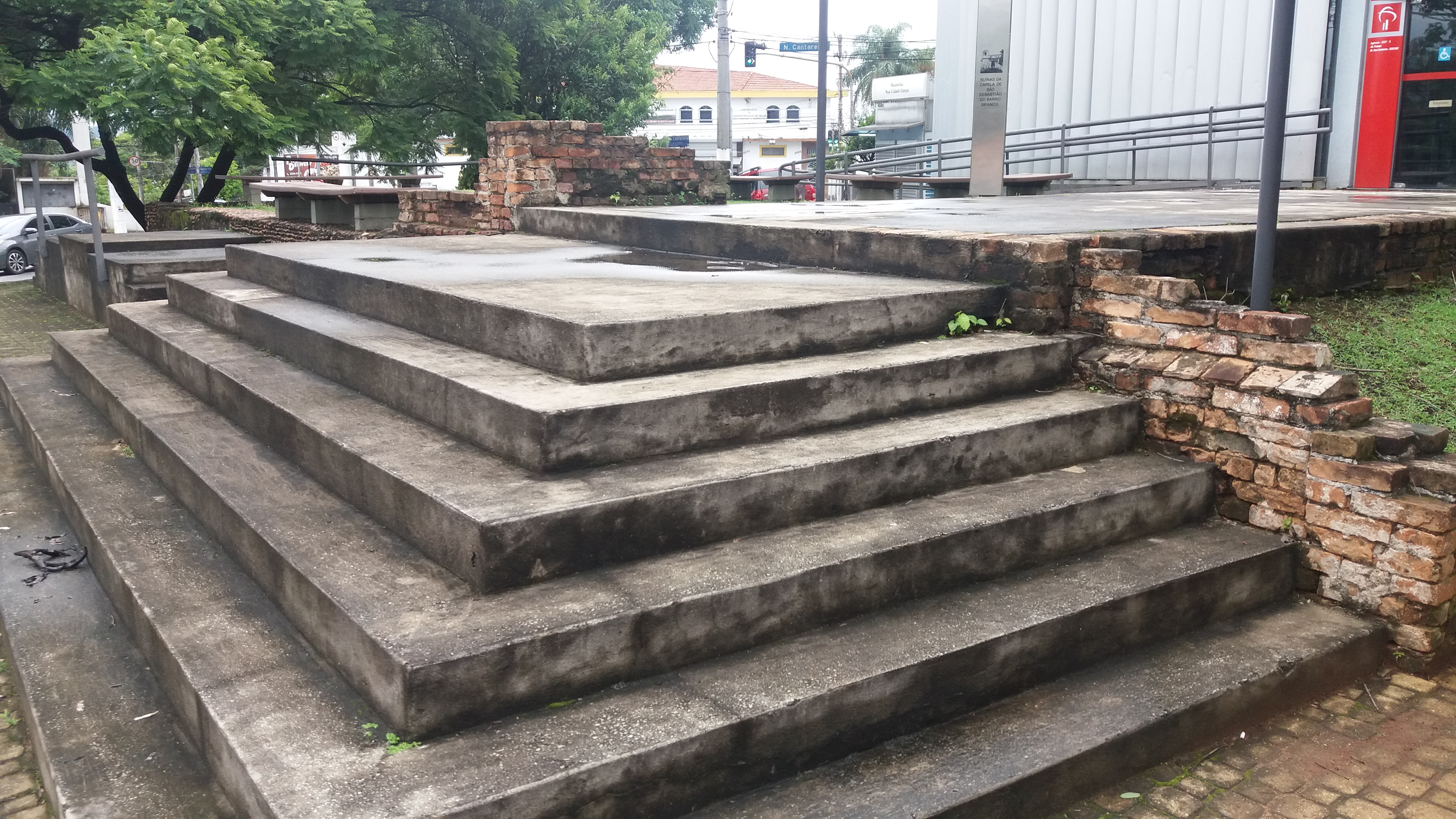 Detalhe da antiga escada de entrada da capela. Parte das ruínas tombadas pelo CONPRESP (Conselho Municipal de Preservação do Patrimônio Histórico, Cultural e Ambiental da Cidade de São Paulo) da Capela de São Sebastião do Barro Branco, na esquina entre a Avenida Água Fria e a Avenida Nova Cantareira.